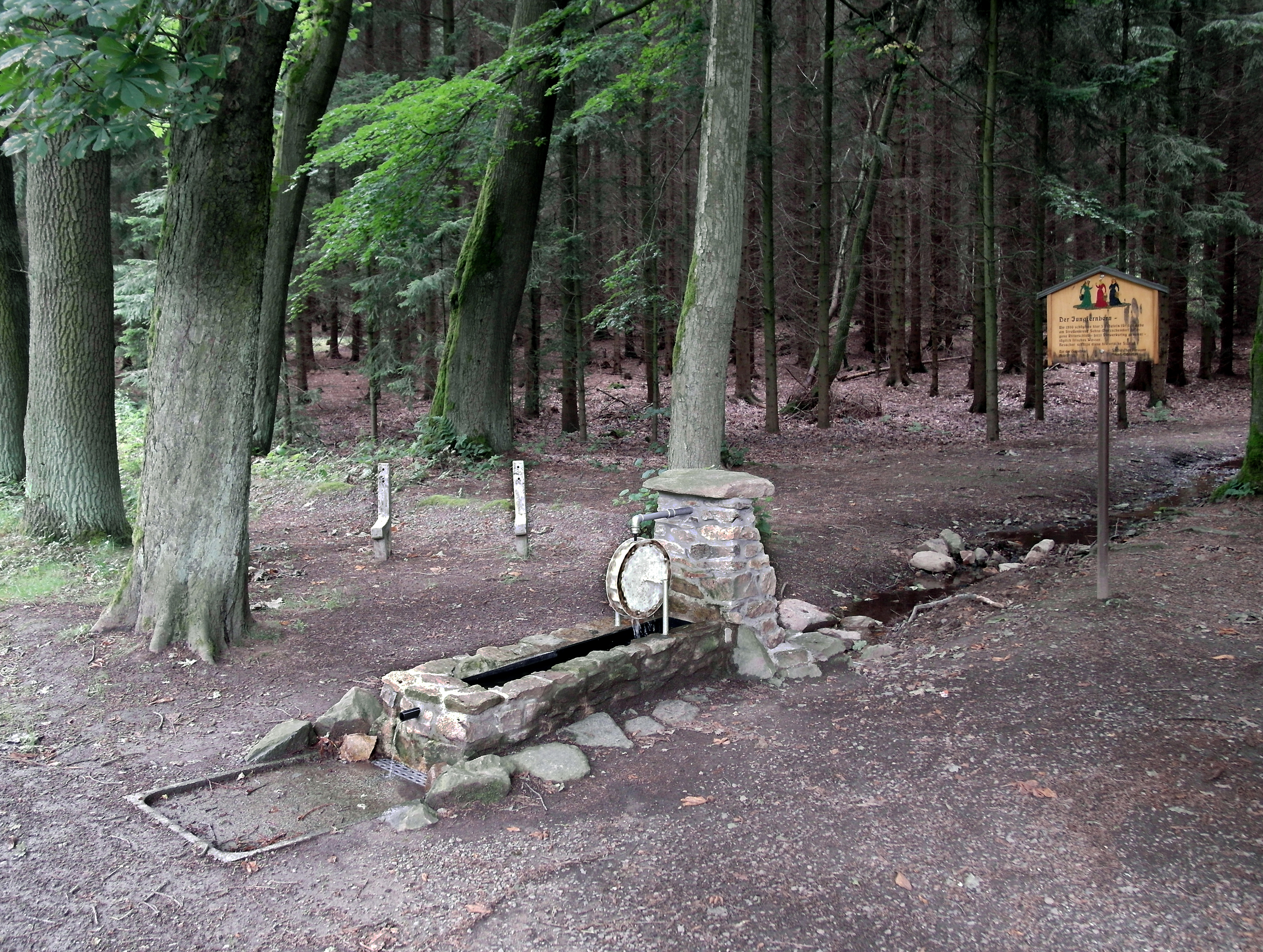 12.07.2017 09627 Oberbobritzsch (Bobritzsch-Hilbersdorf): Der "Jungfernborn". Legende: Um 1200 schöpften hier 3 Fräulein für das nahe am Straßenkreuz gelegene Ritterschloß Sohra - jetzt Vorwerksring genannt - täglich frisches Wasser.